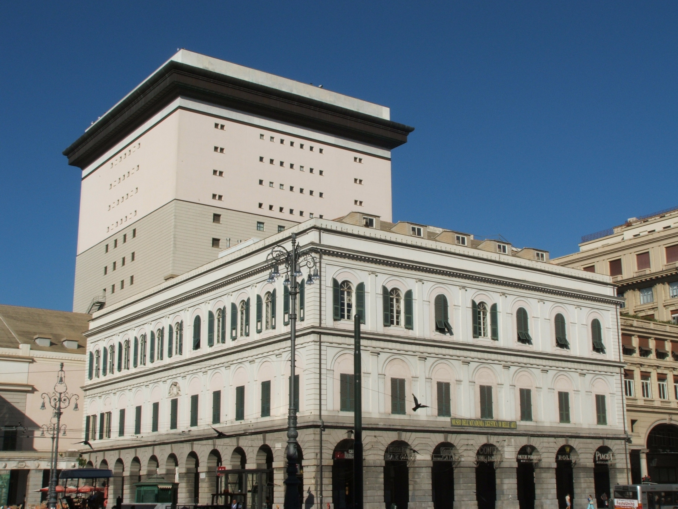 Immagine da Genova